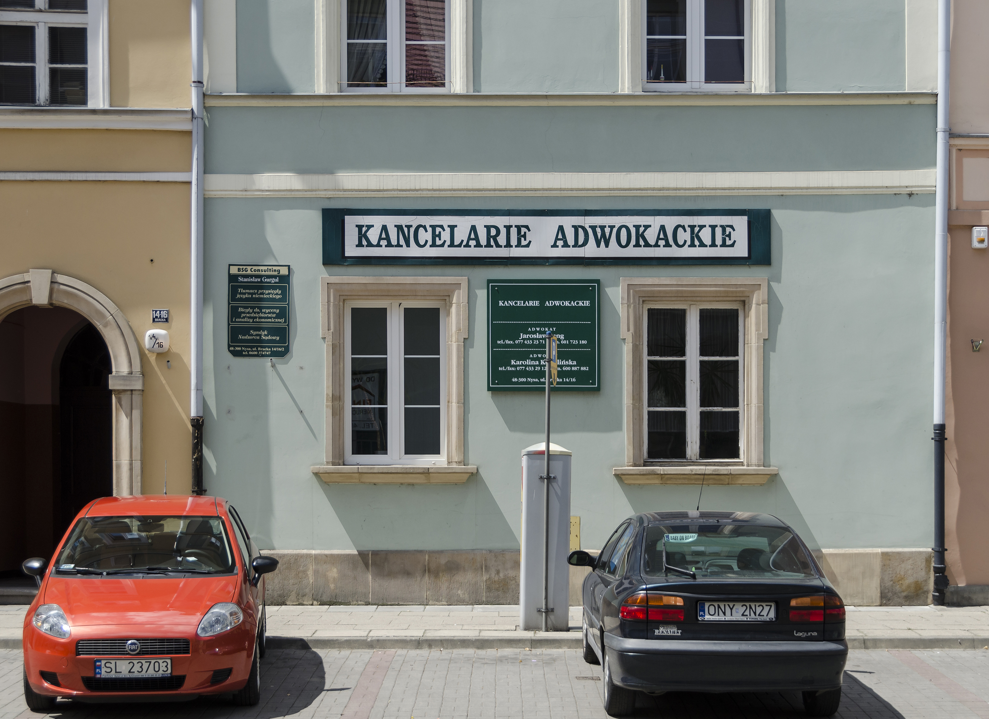 Nysa, dom, XVIII, 1956